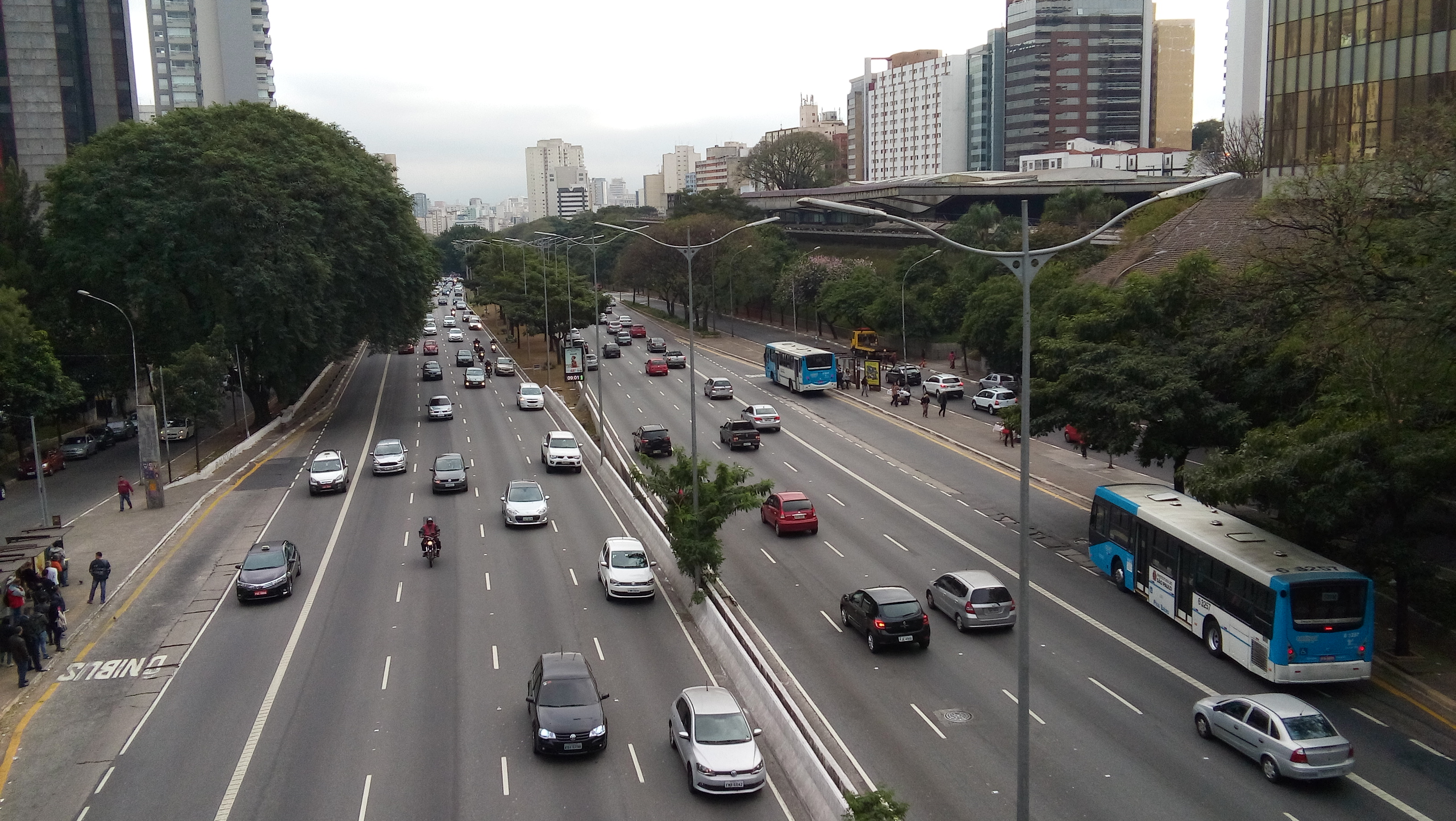 Avenida 23 de Maio, cidade de São Paulo